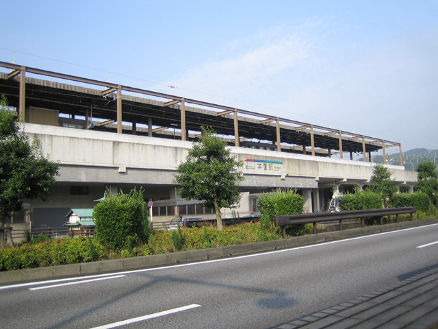 本宿駅